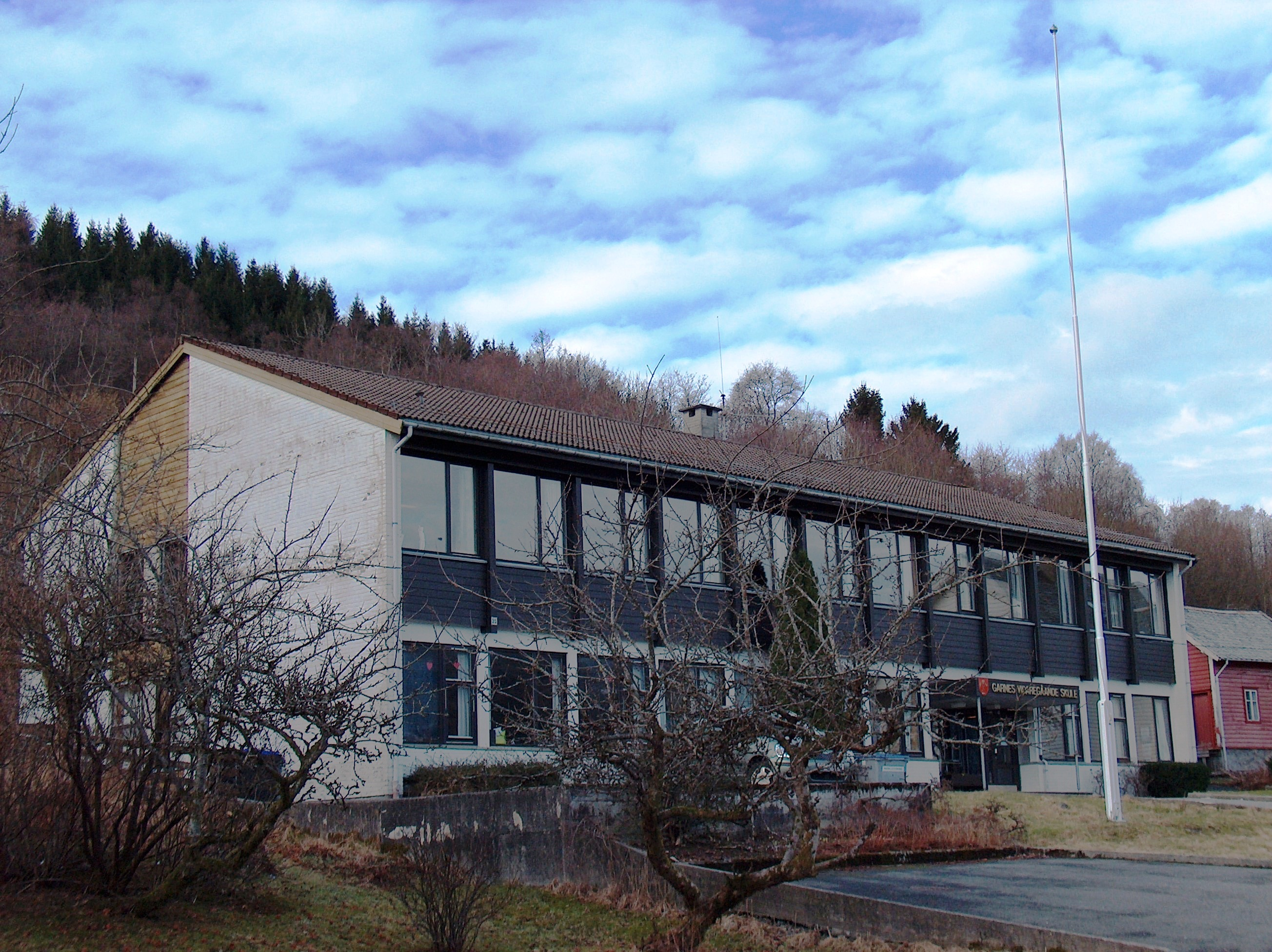 Garnes videregåande skule